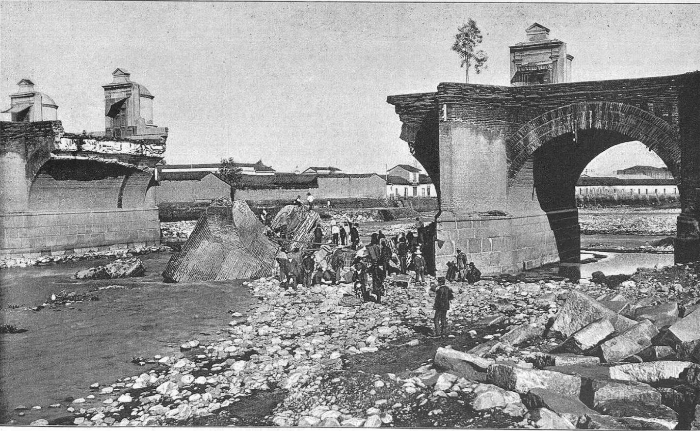 Santiago. - Segundo derrumbe de dos arcos del puente de Cal y canto, visto de cerca del Machón. (copia directa de fotografía).